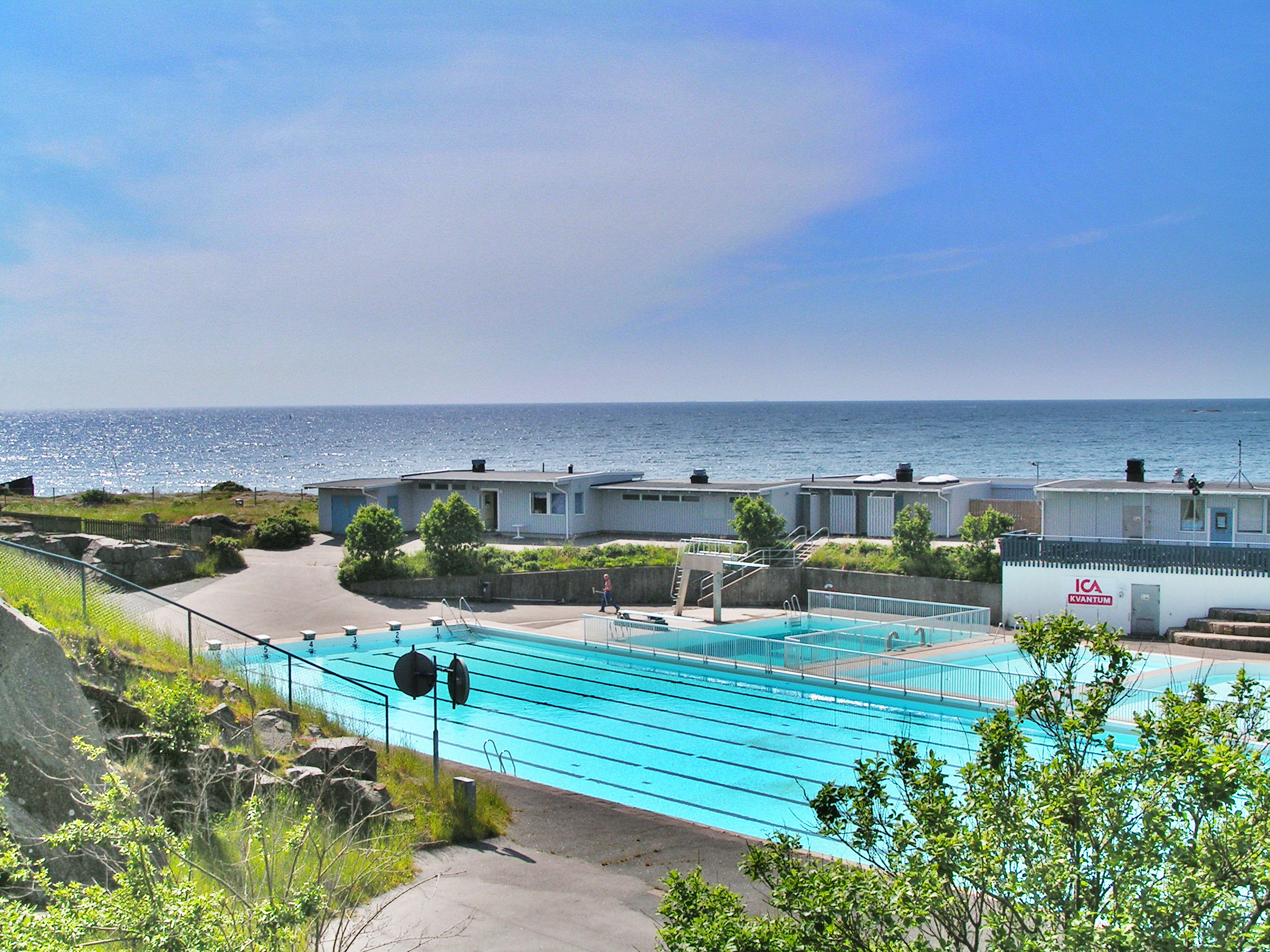 Vy över simstadion 2009